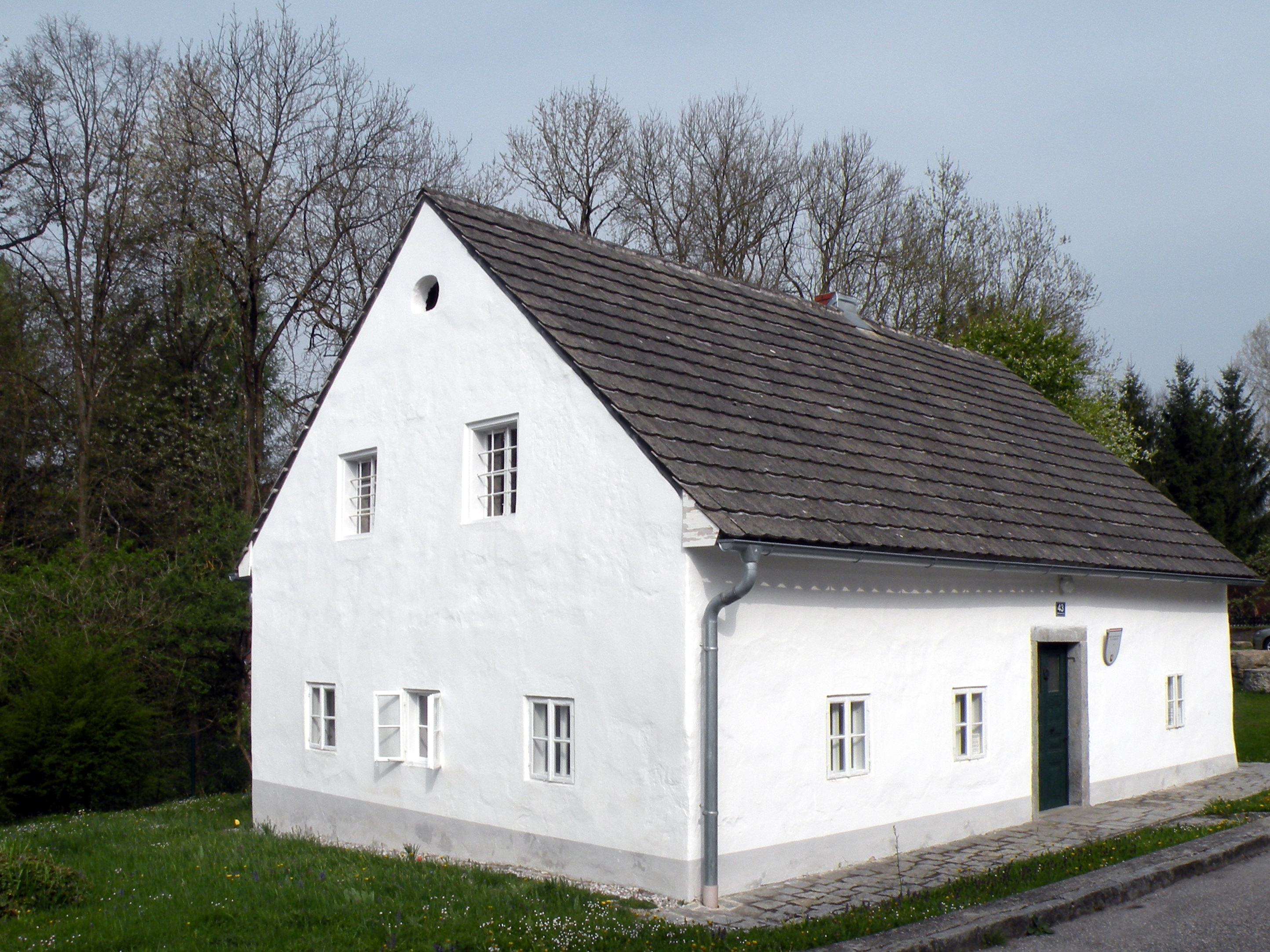 denkmalgeschütztes Steinbrecherhaus in Perg in Oberösterreich